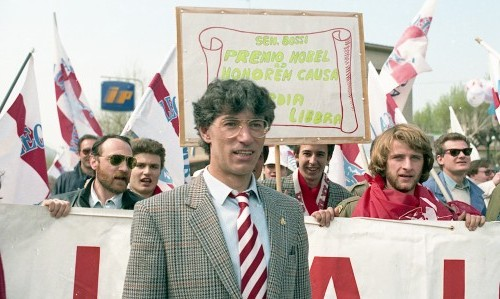 Umberto Bossi (Cassano Magnago, 19 settembre 1941) a Pontina nel 1990